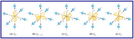 Koordinazio konposatu oktaedrikoen orbitalak